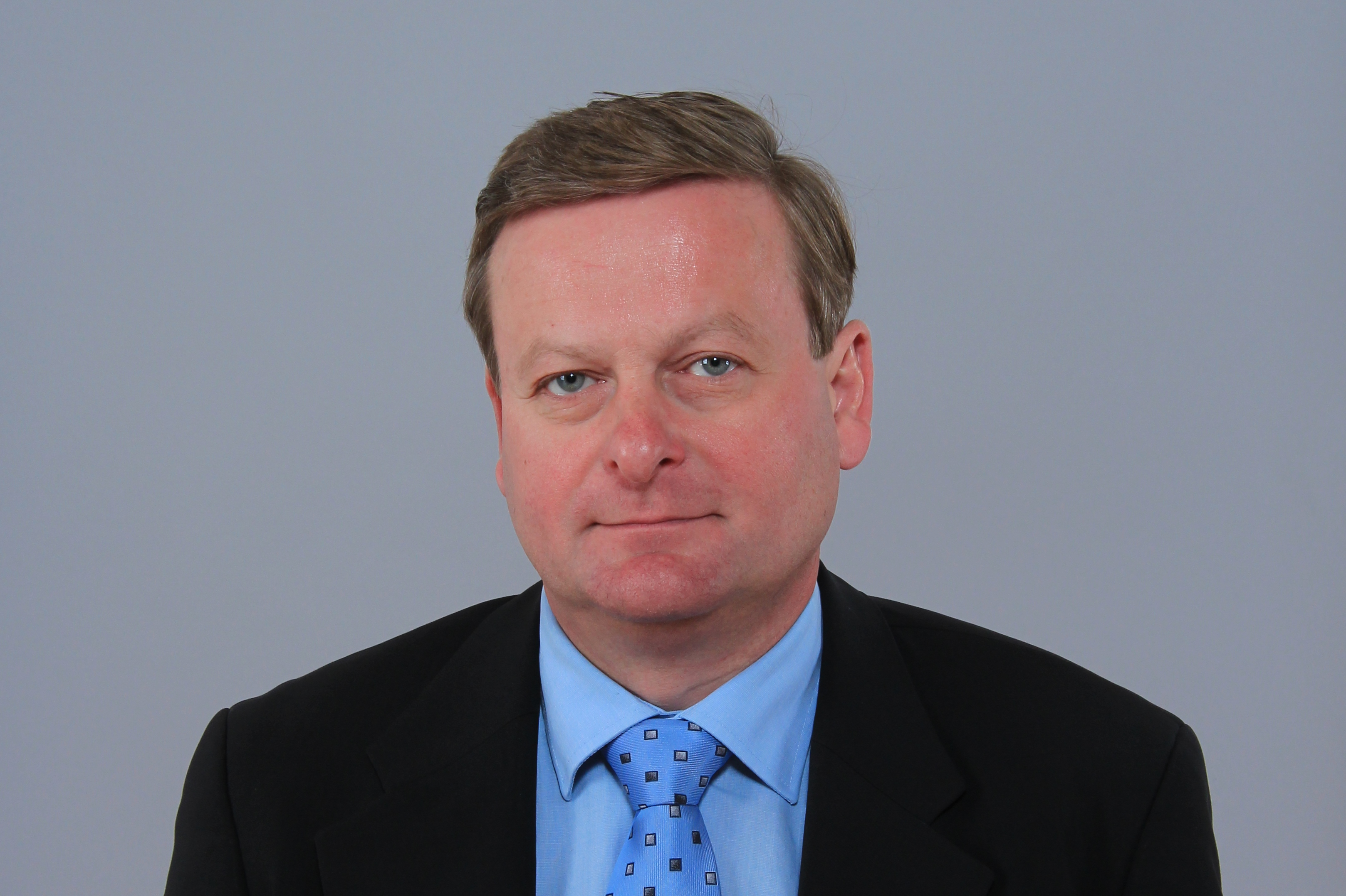 Gottfried Waldhäusl, Mitglied des niederösterreichischen Landtages Wikipedia im Landtag – Niederösterreich 23. Mai 2013 in St. Pölten Fragen zur Nachnutzung Wenn Sie Fragen zur Nachnutzung dieses Bildes haben, können Sie sich jederzeit gern an wenden Personality rights warningAlthough this work is freely licensed or in the public domain, the person(s) shown may have rights that legally restrict certain re-uses unless those depicted consent to such uses. In these cases, a model release or other evidence of consent could protect you from infringement claims.